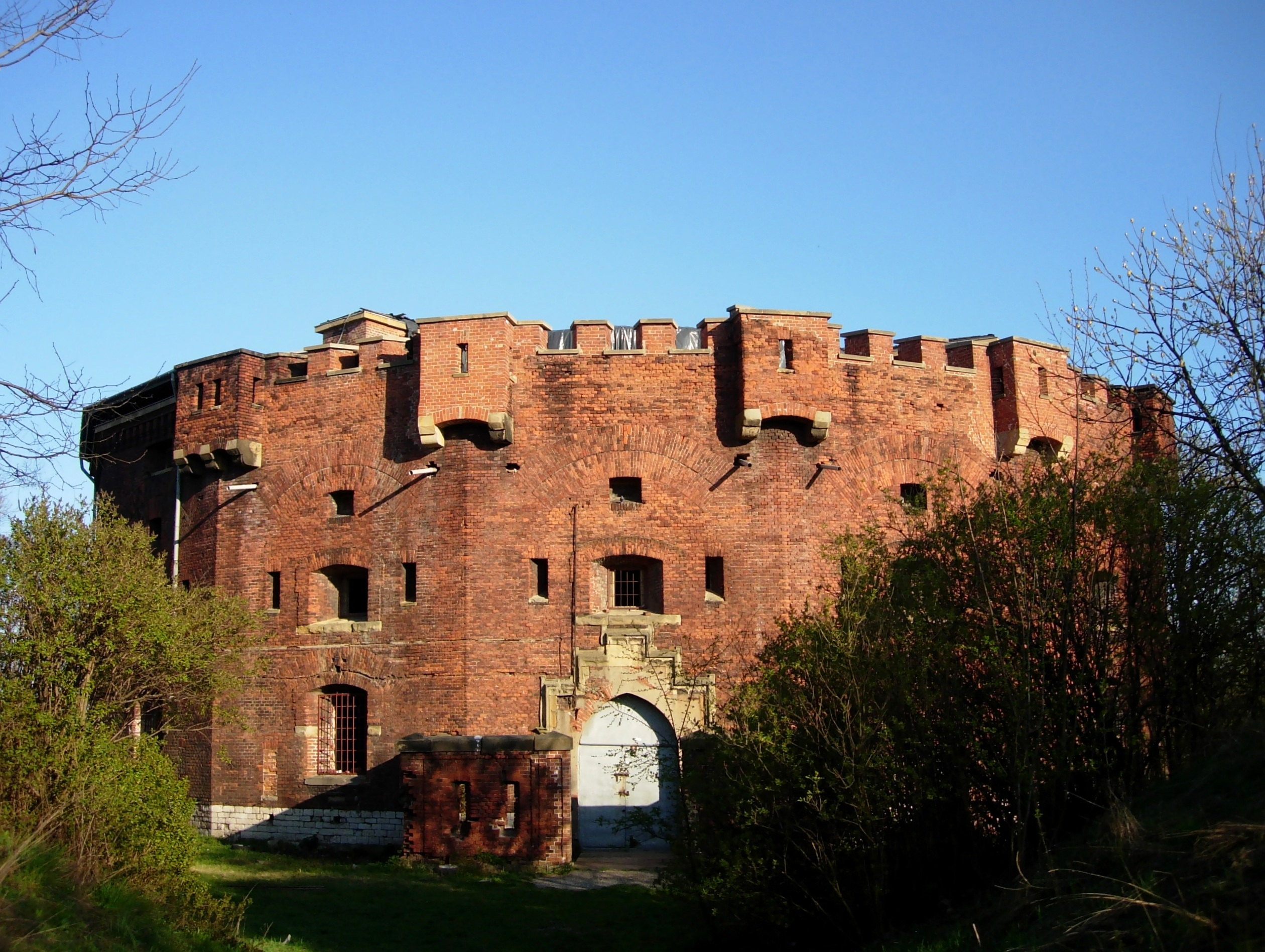 Fort 31 Benedykt, Kraków